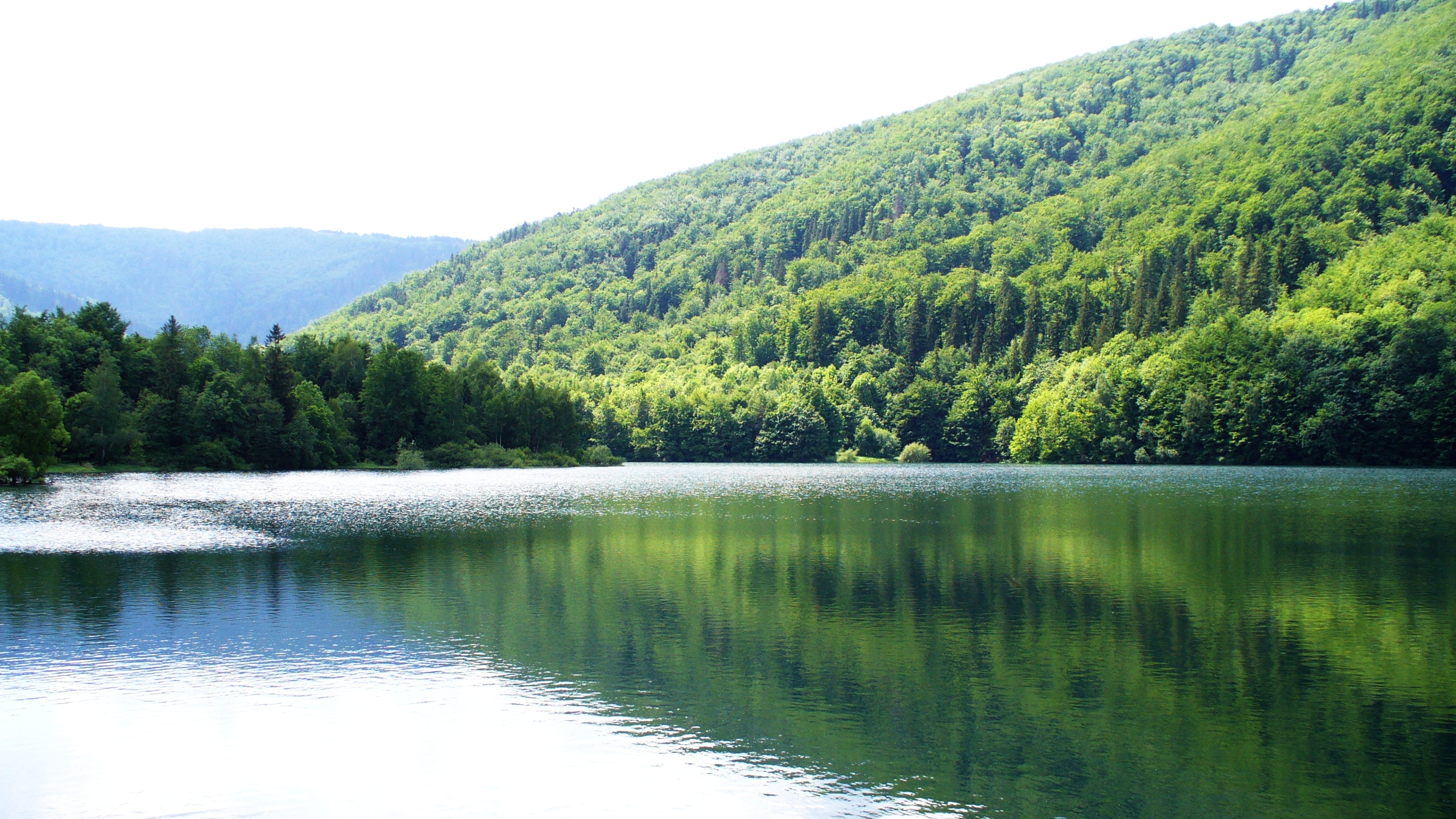 Zbiornik wody pitnej "Wielka Łąka" w Wapienicy